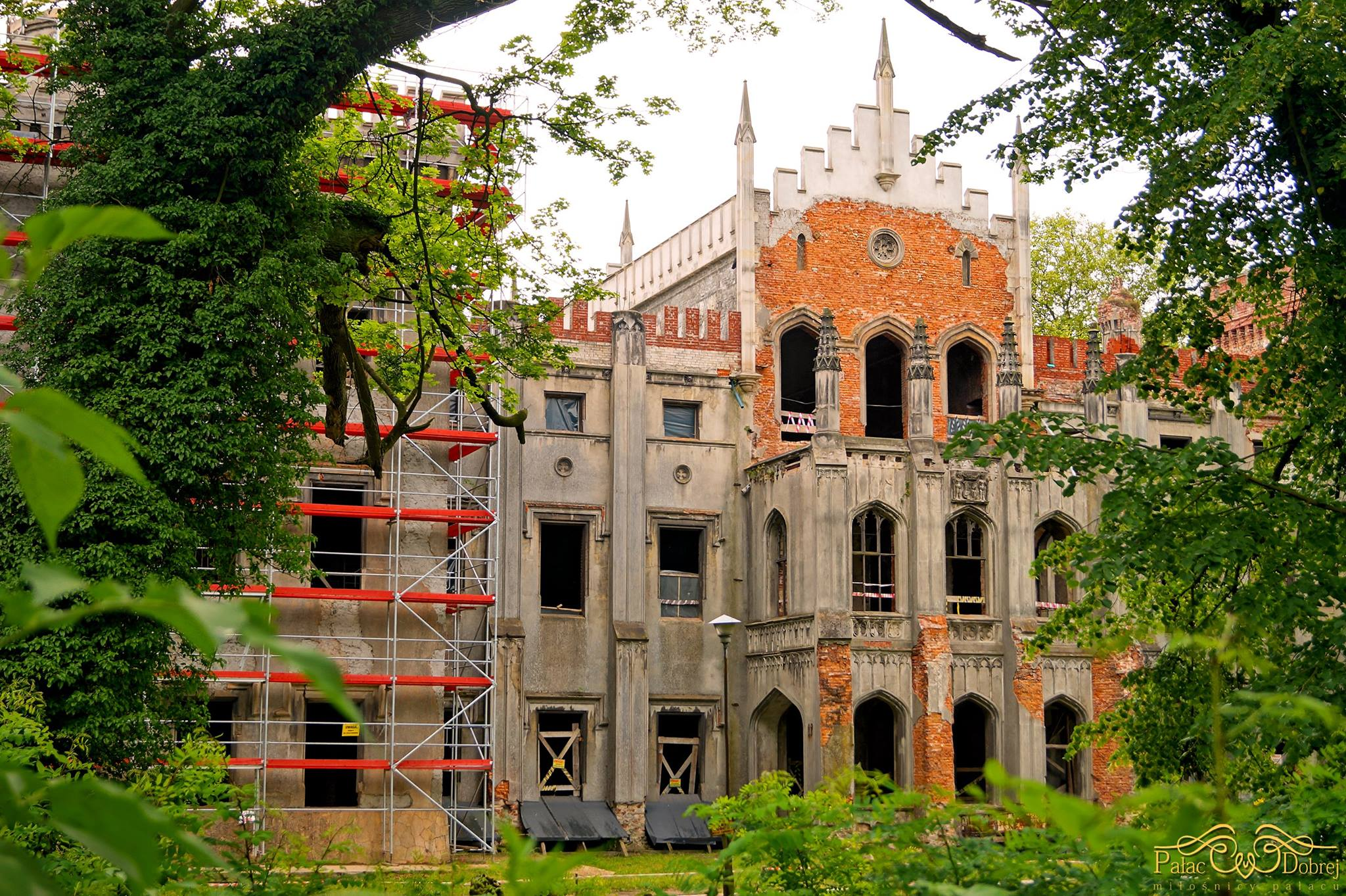 Stan pałacu obecnie